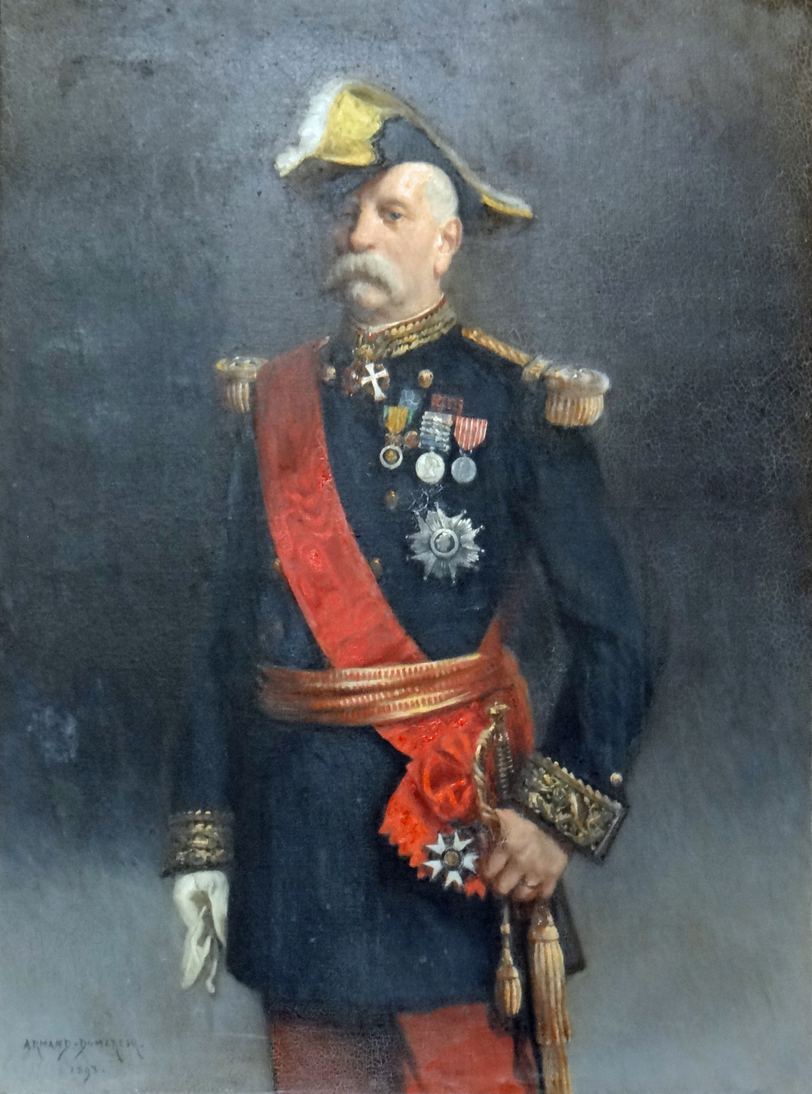 Portrait de Victor Février, grand chancelier de la Légion d'honneur